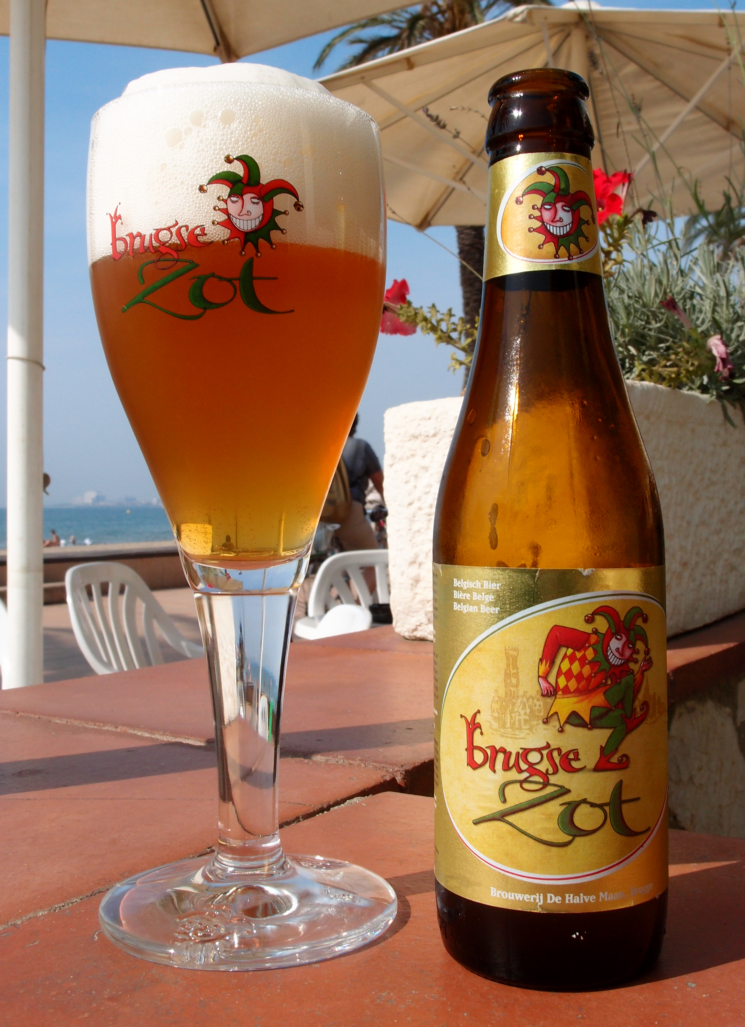 "Brugse Zot" im Originalglas - belgisches Bier der Brauerei "De Halve Maan" Datum: 08.09.2012 Urheber: M. Pfeiffer alias Benutzer:Gordito1869 Quelle: privates Fotoarchiv des Urhebers